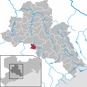 Niederwiesa in Saxony - district Mittelsachsen